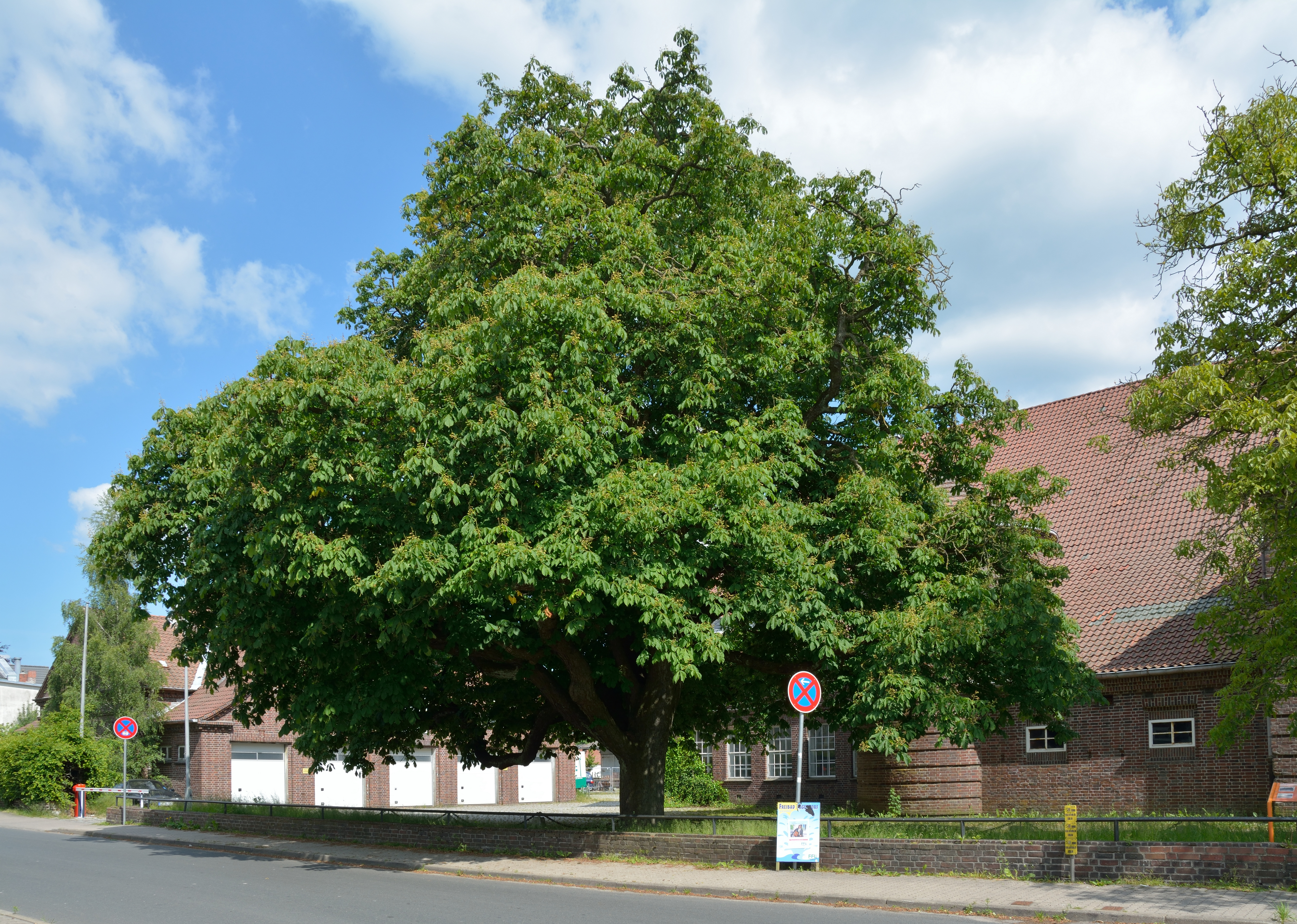 Naturdenkmale im Kreis Steinburg in Lägerdorf. Eine 150jährige Kastanie ist das Naturdenkmal Nummer 15.